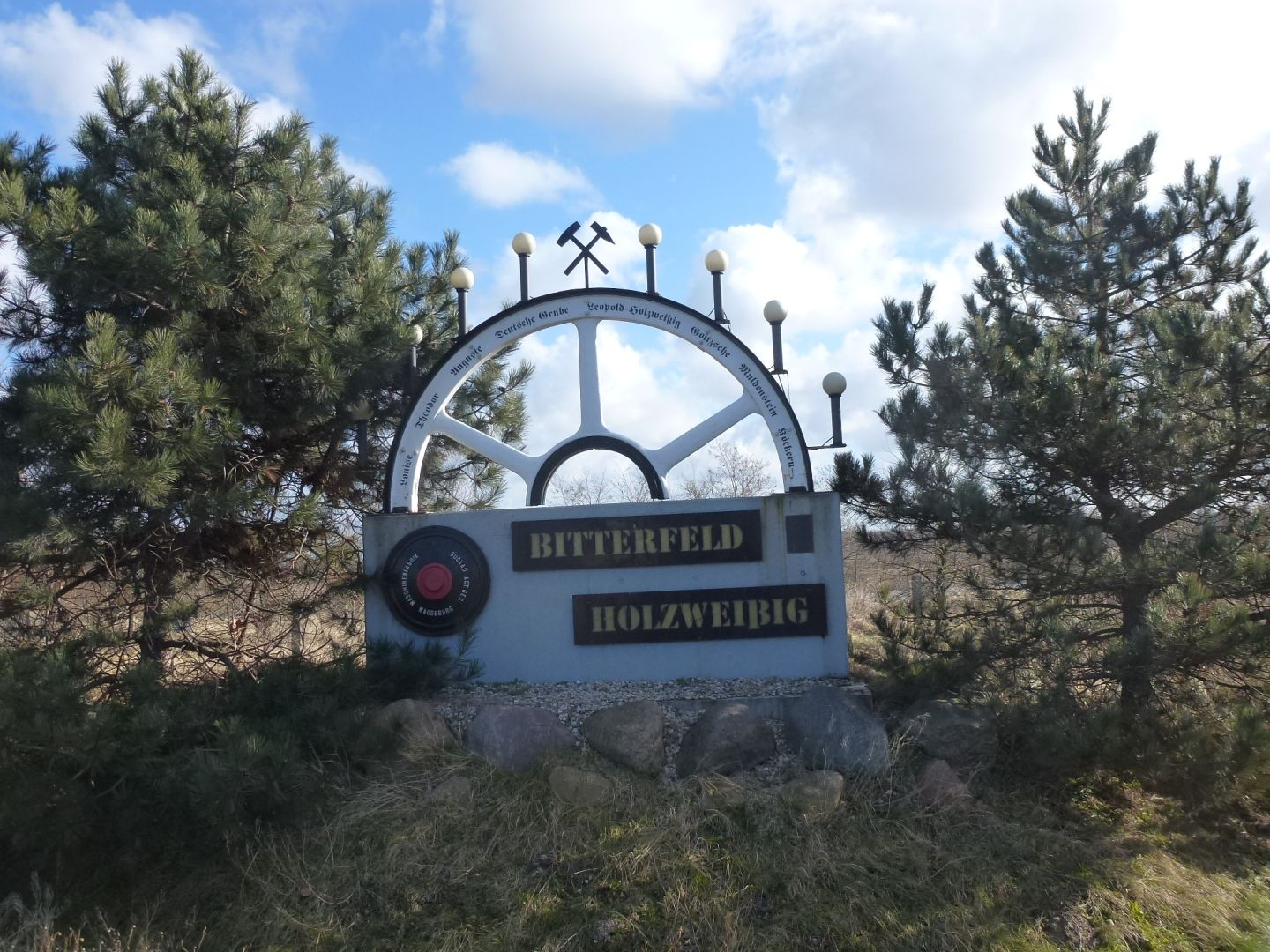 Bergbau-Denkmal in Holzweißig